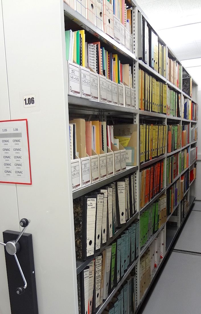 Archives du Centre pour l'action non-violente à la Bibliothèque de la Ville de La Chaux-de-Fonds.